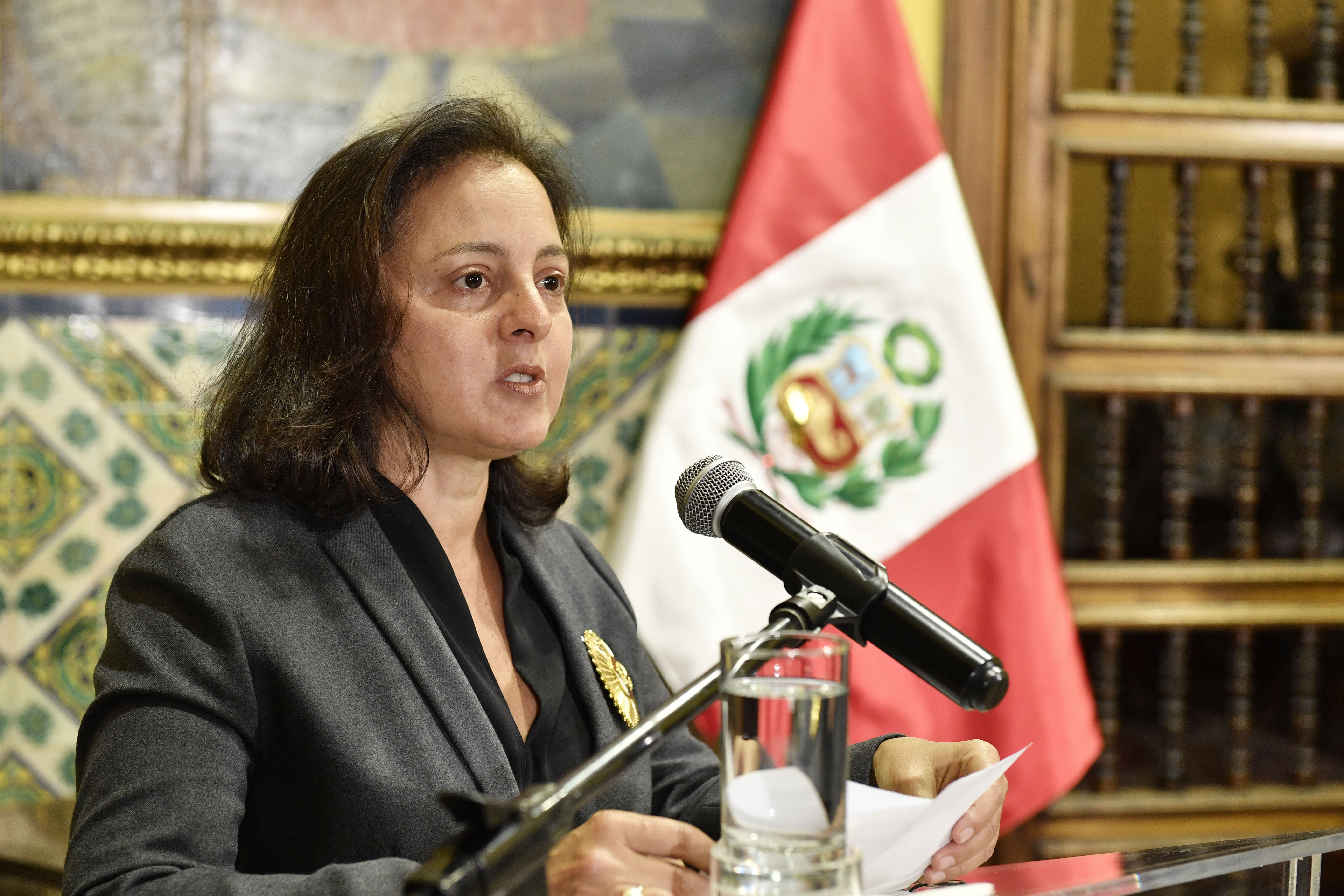 Reconocimiento por su contribución profesional y académica a la señora Natalia Majluf Brahim, en la promoción del arte peruano expresada en su destacada labor en la curaduría y organización de diversas exhibiciones artísticas vinculadas a nuestra historia realizadas en el Perú y el exterior. Asimismo, el reconocimiento a su importante producción bibliográfica y estudios sobre la figura del indígena y la identidad criolla, así como también, su labor como gestora cultural, en la cual se destaca la conducción del Museo de Arte de Lima (MALI) por más de quince años.